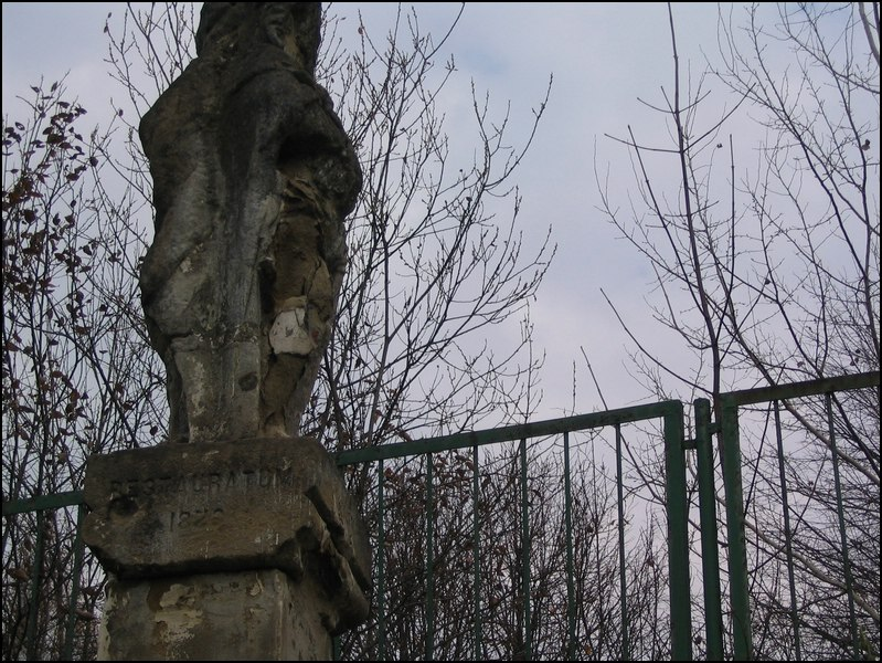 Kraków (Bronowice Wlk)-figura dwóch postaci